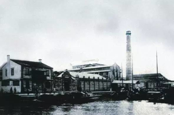 中文（香港）: 1915年的茂新麵粉廠舊址